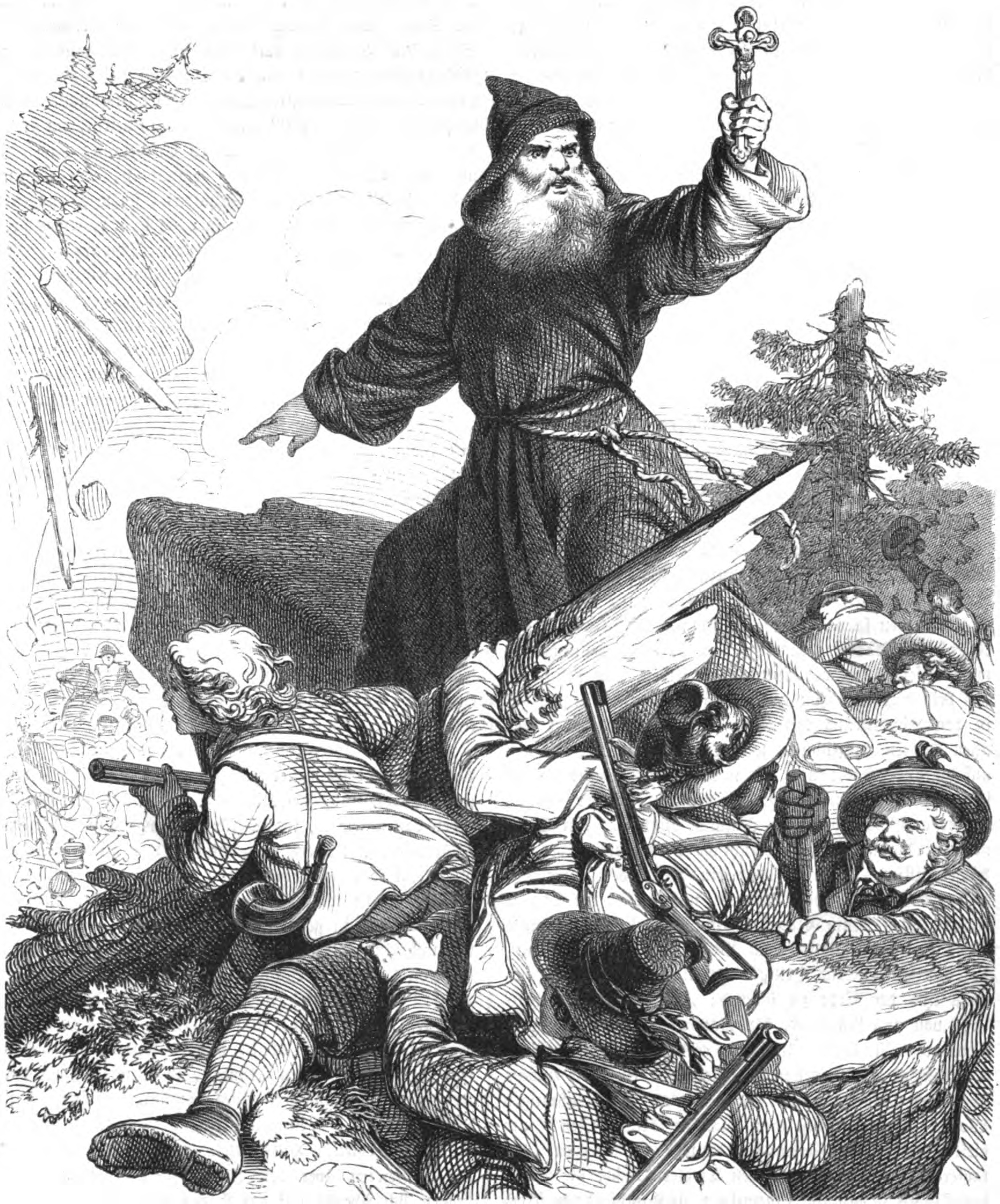 Joachim Haspinger, Kapuzinerpater und Tiroler Freiheitskämpfer gegen Napoleon.